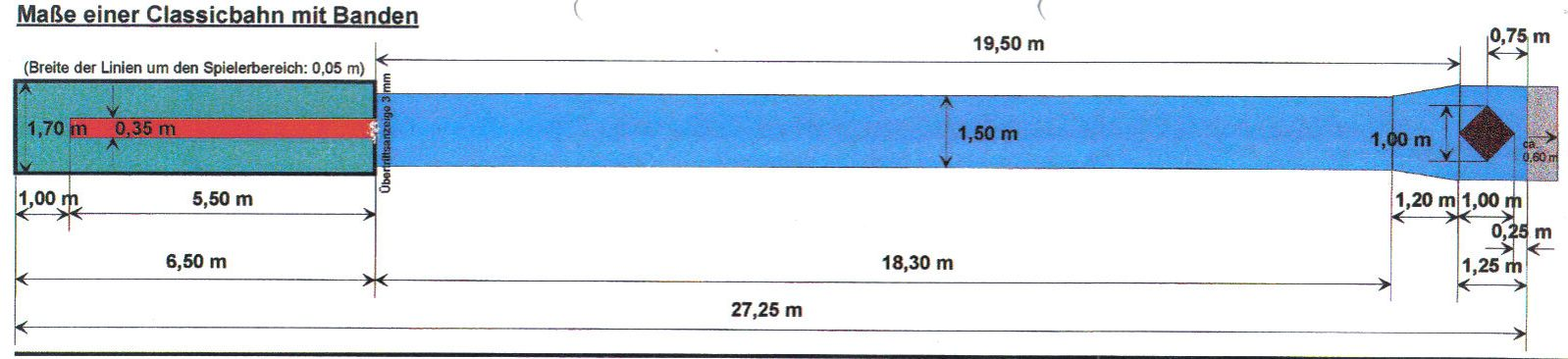 Maße einer Classicbahn mit Banden